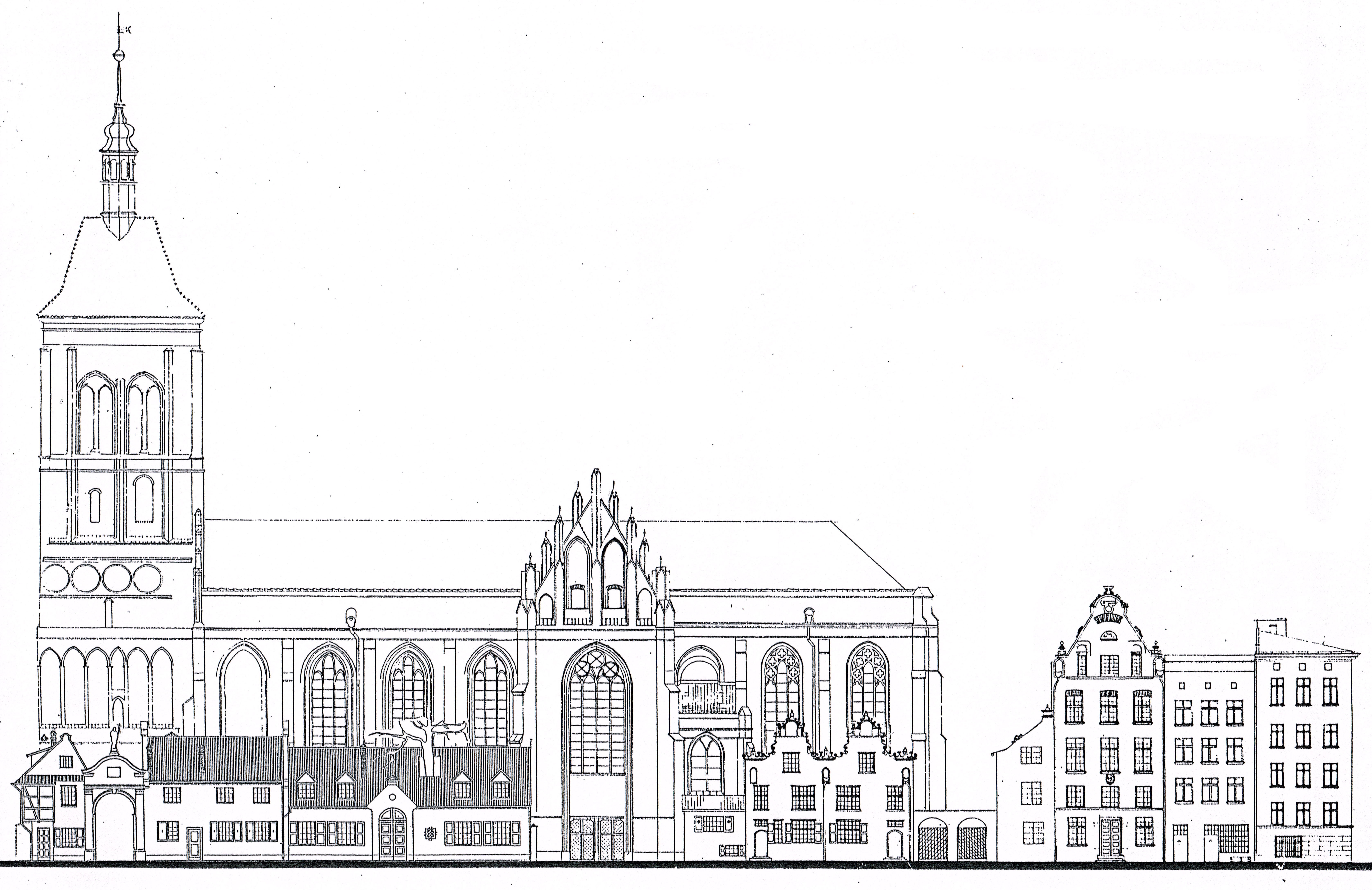 Rysunek z projektu adaptacji kościoła wraz z otoczeniem na Międzynarodowe Centrum Kulturalno-Kongresowe